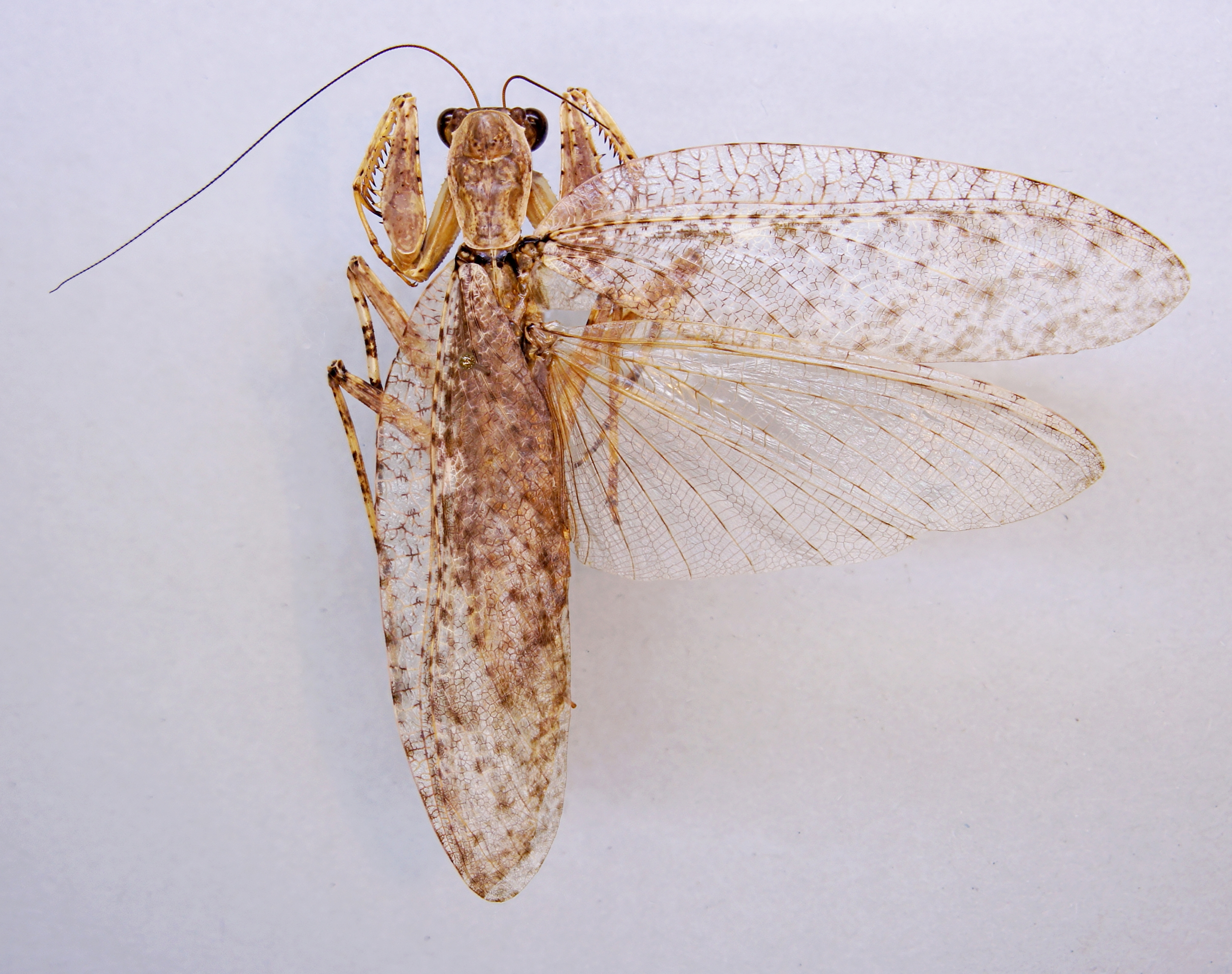 Theopompa borneana (Giglio-Tos, 1917) ♂ Herkunft: Malaysia, Cameron Highlands